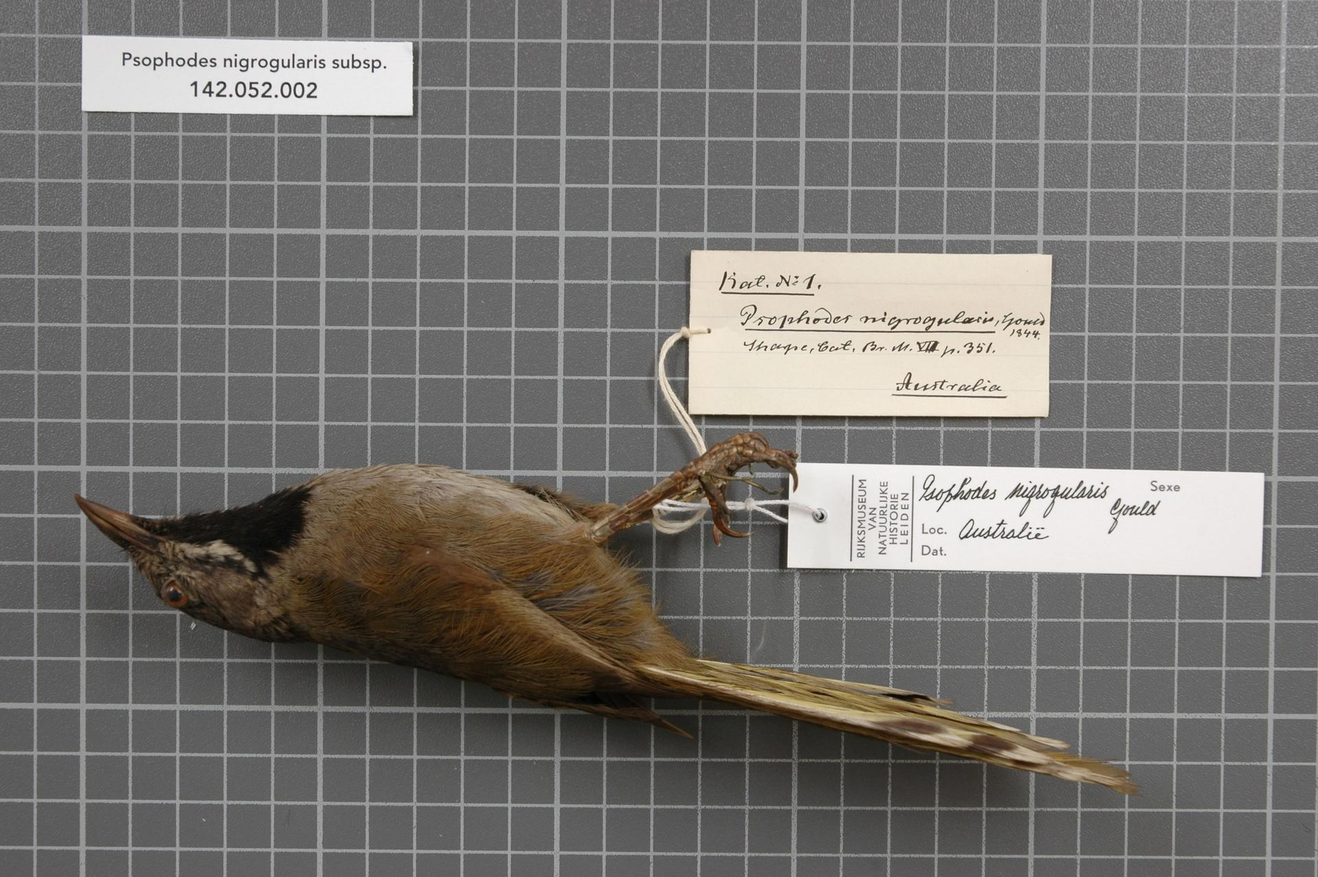 Psophodes nigrogularis subsp.